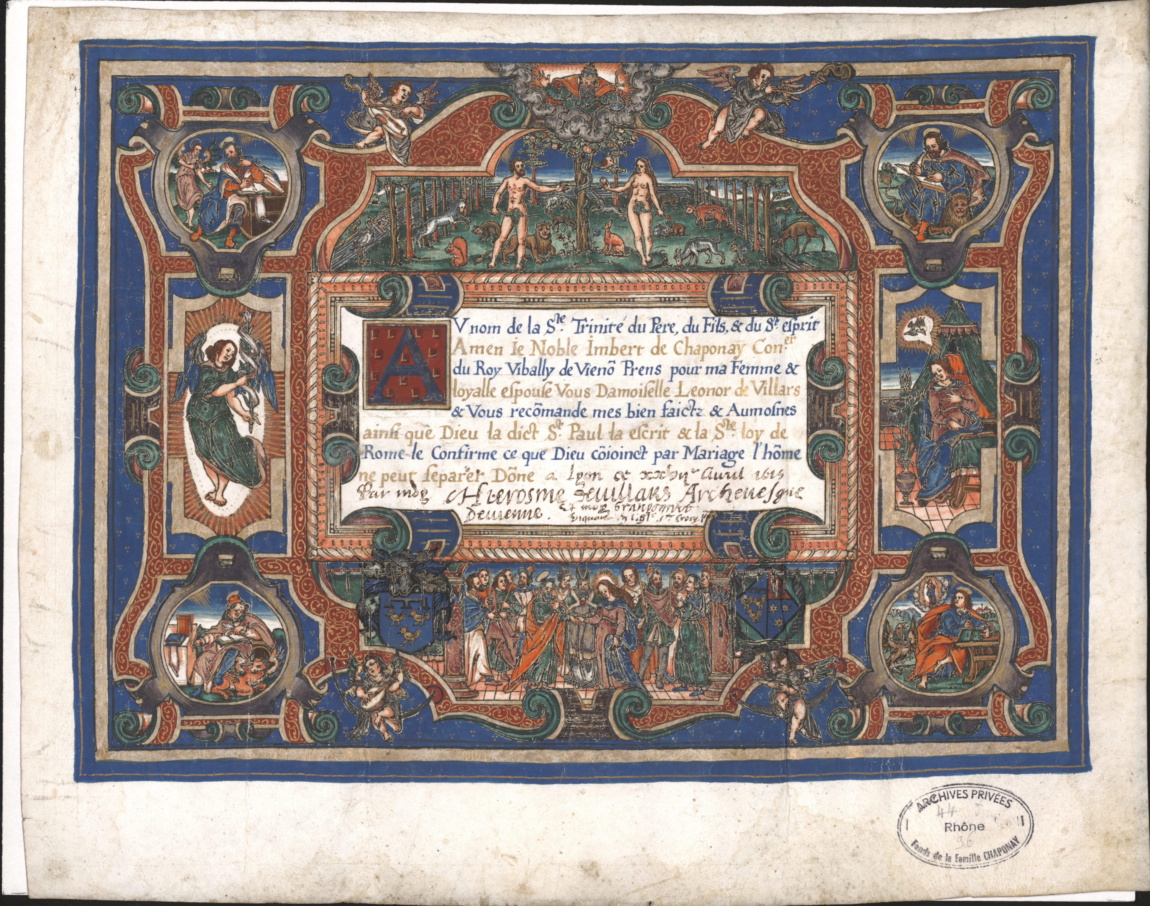 Archives du département du Rhône et de la métropole de Lyon, fonds Chaponay, 44 J 96